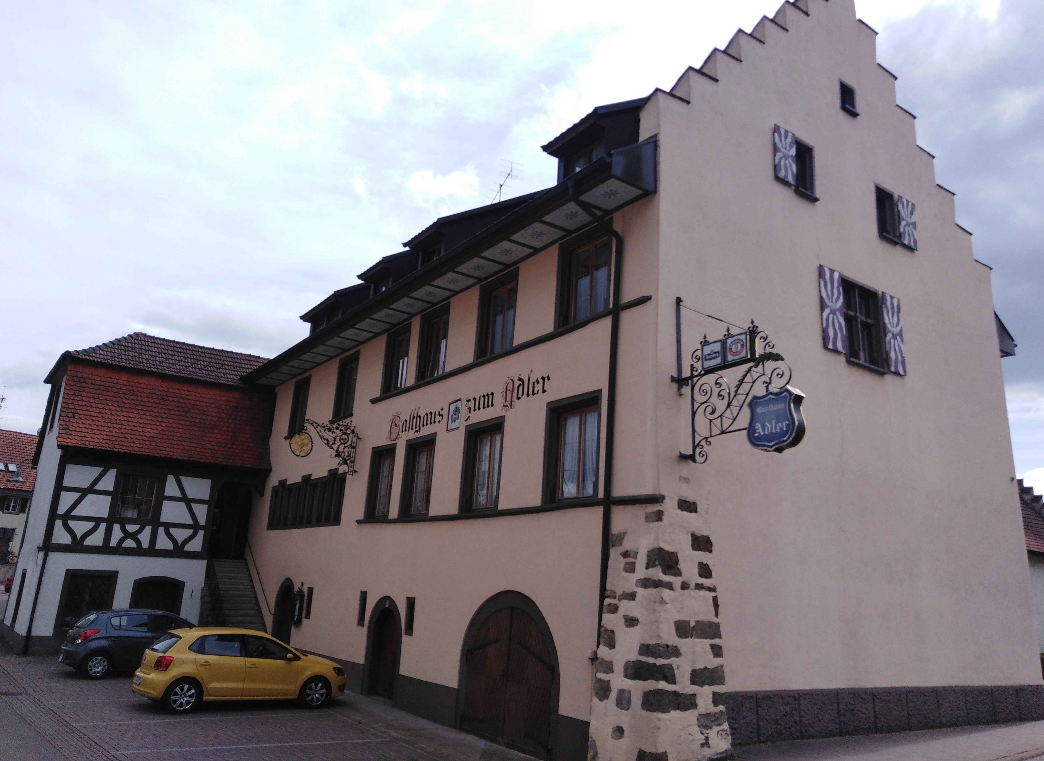 Lauchringen, Gemeinde im Landkreis Waldshut in Baden Württemberg. Der seit 700 Jahren bestehende Gasthof Adler in Oberlauchringen.